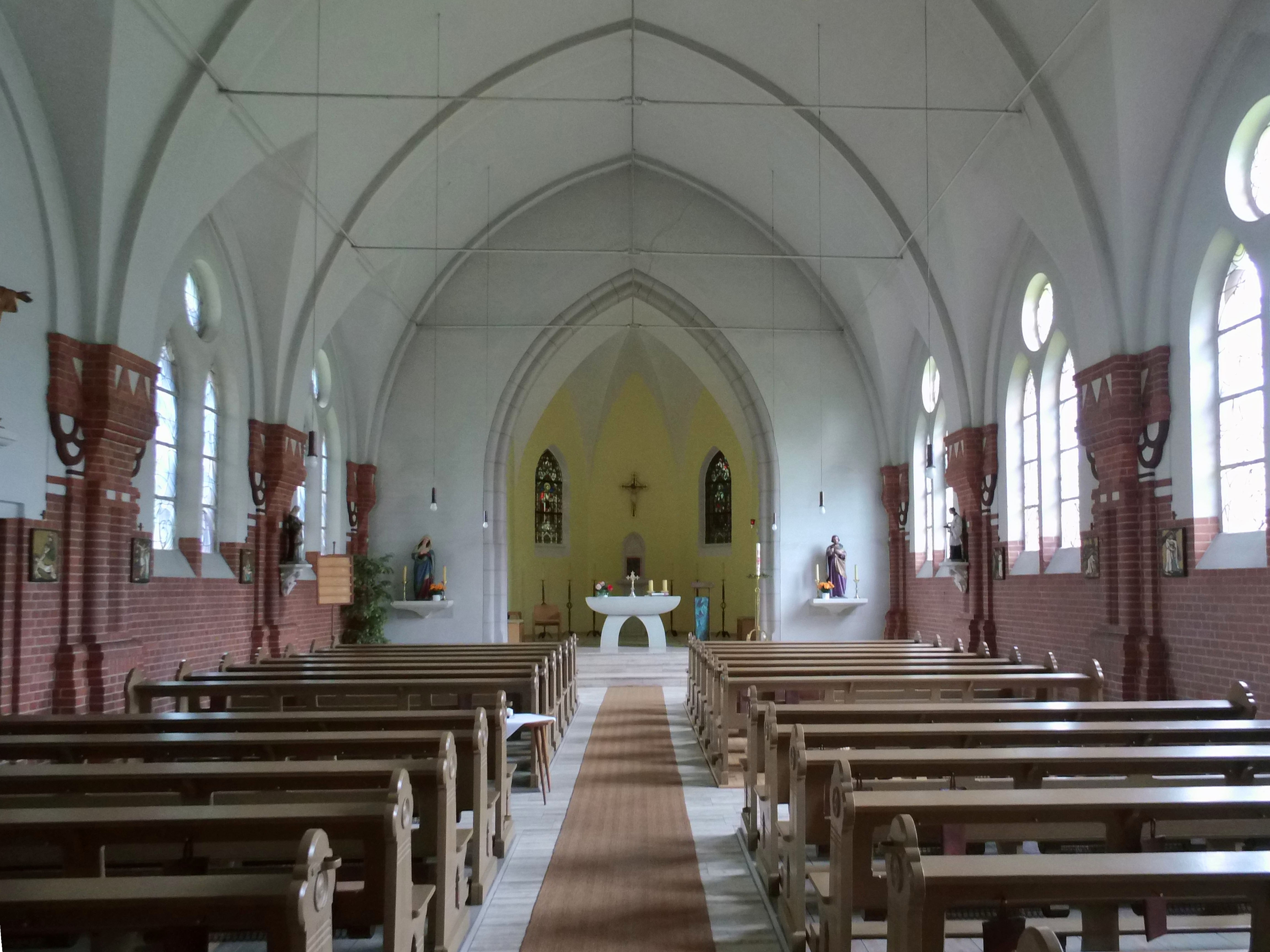 Katholische Herz-Jesu-Kirche in Völpke (Sachsen-Anhalt)